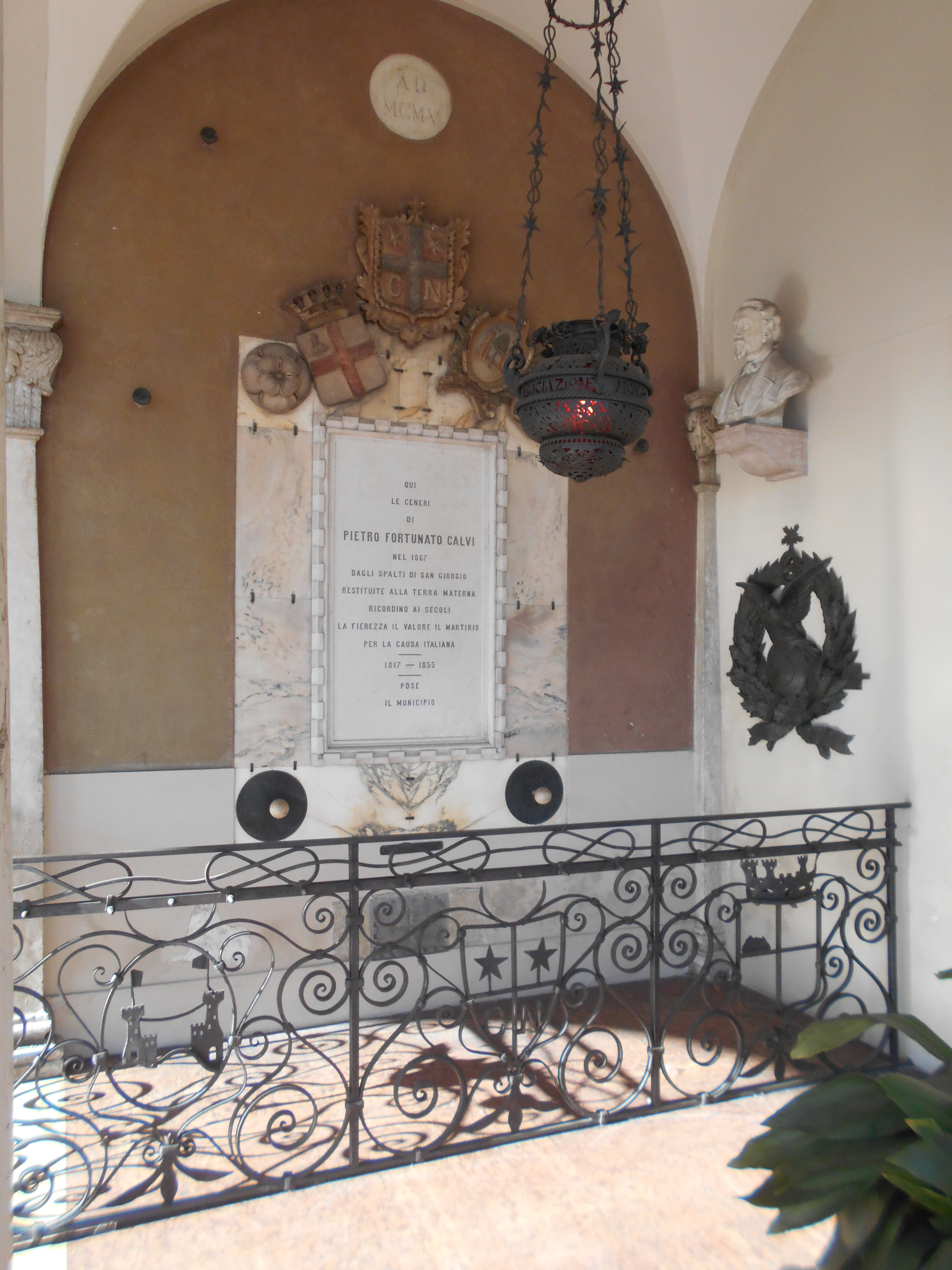 Ceneri, Pietro Fortunato Calvi, Noale